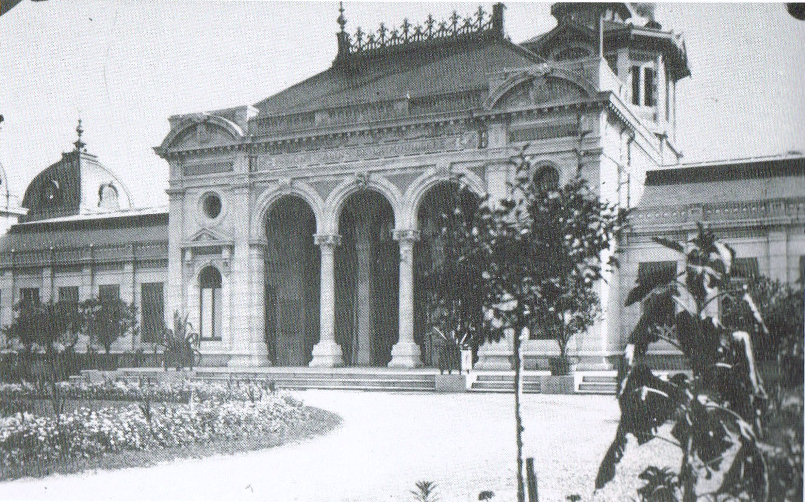 Entrée de l'établissement thermal de Besançon-les-Bains.